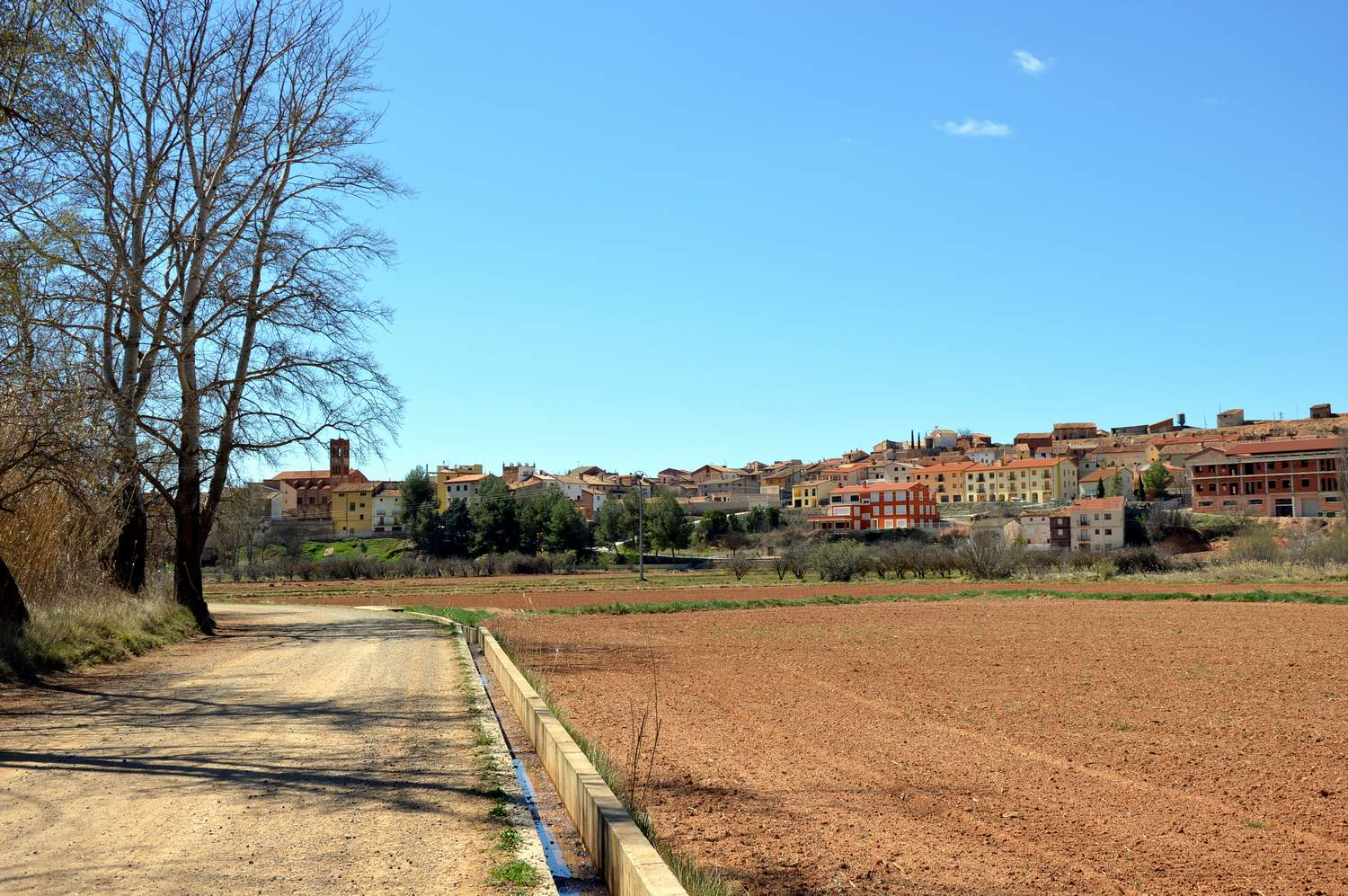 Vista general de Torrebaja (Valencia), desde la ribera del Turia (2016).